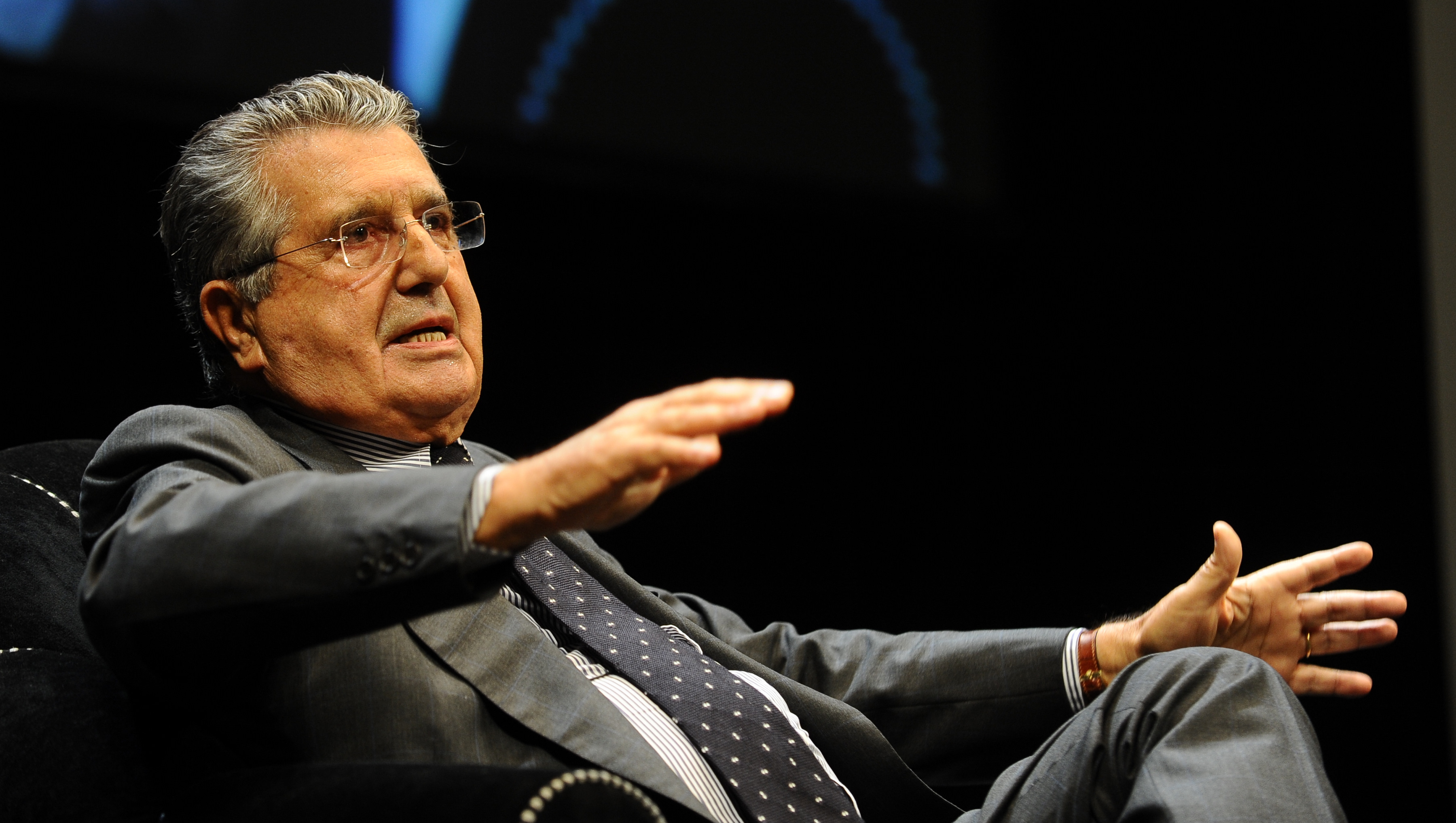 Carlo De Benedetti al Festival dell'Economia di Trento.